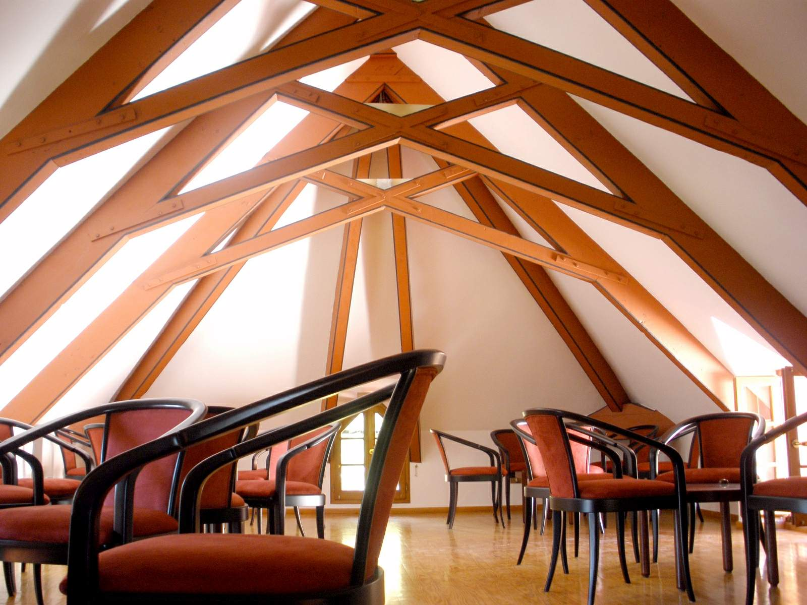 Capricho de Gaudí (Comillas)